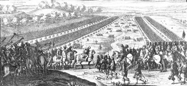 Karl X Gustav mönstrar Rakoczys trupper vid Cmielow den 7 april 1657. Samtida kopparstick.